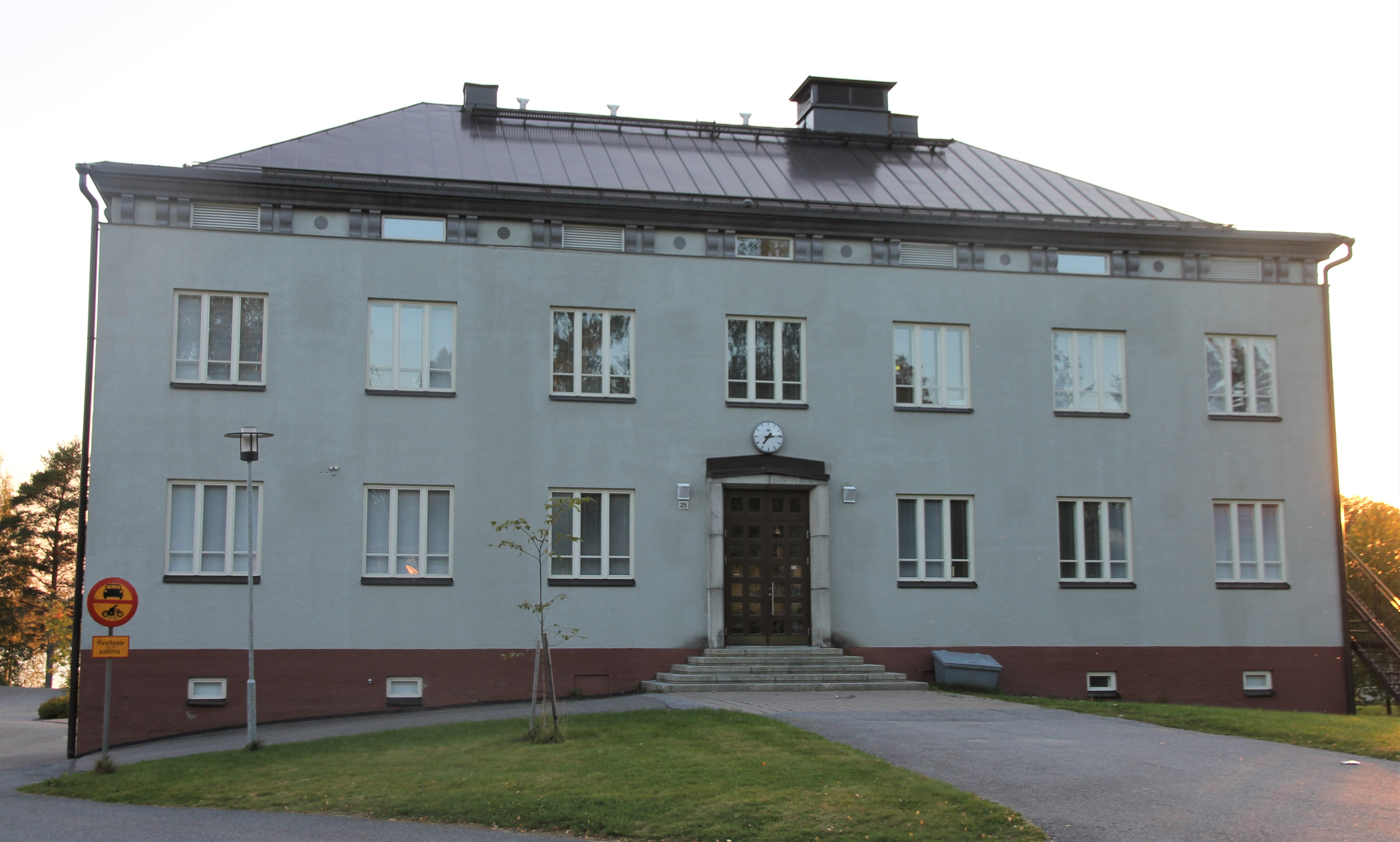 Vehmersalmen koulun rakennus, Vehmersalmenkatu 27, Kuopion Vehmersalmen kaupunginosassa.